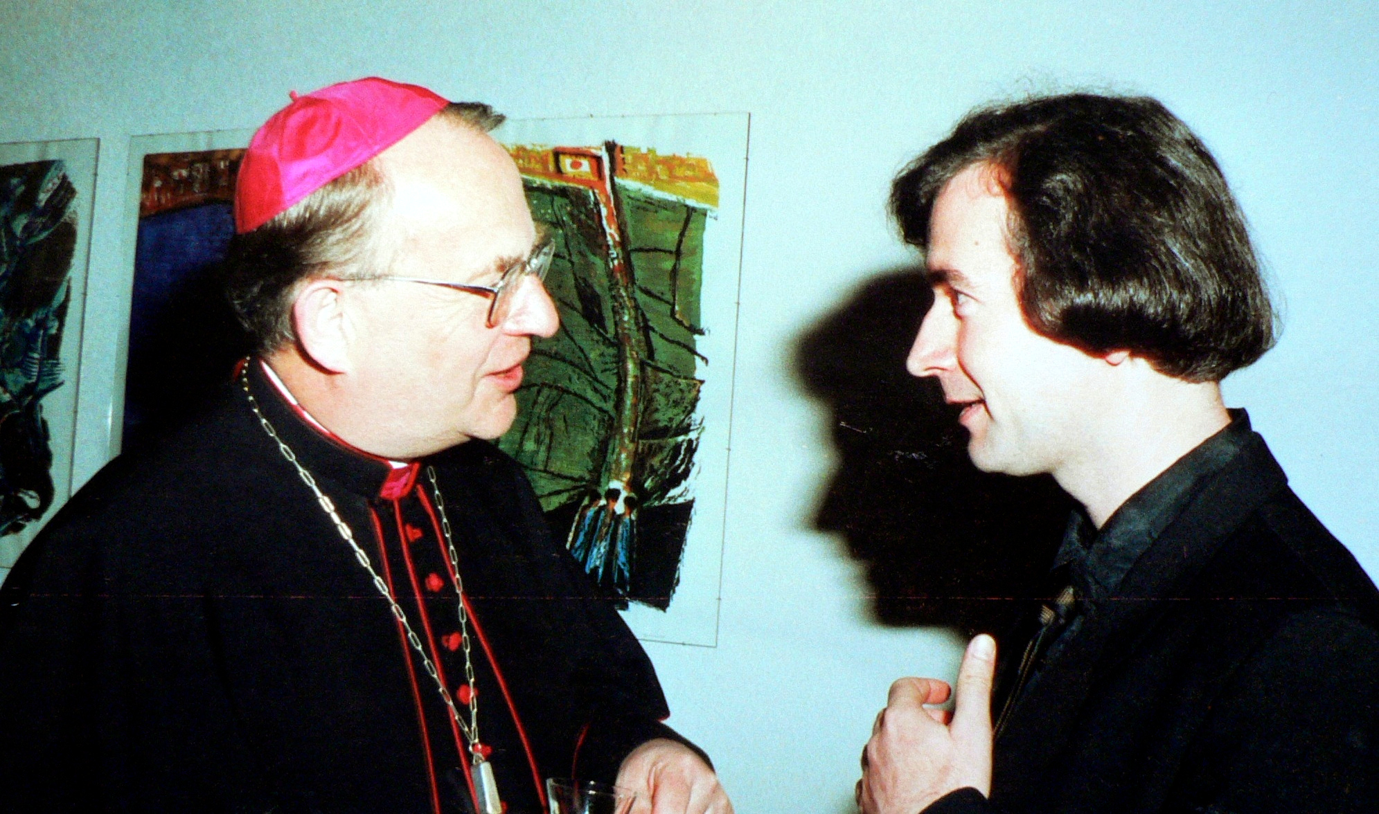 Ludger Stühlmeyer im Gespräch mit Bischof Friedrich Ostermann, Münster 1991